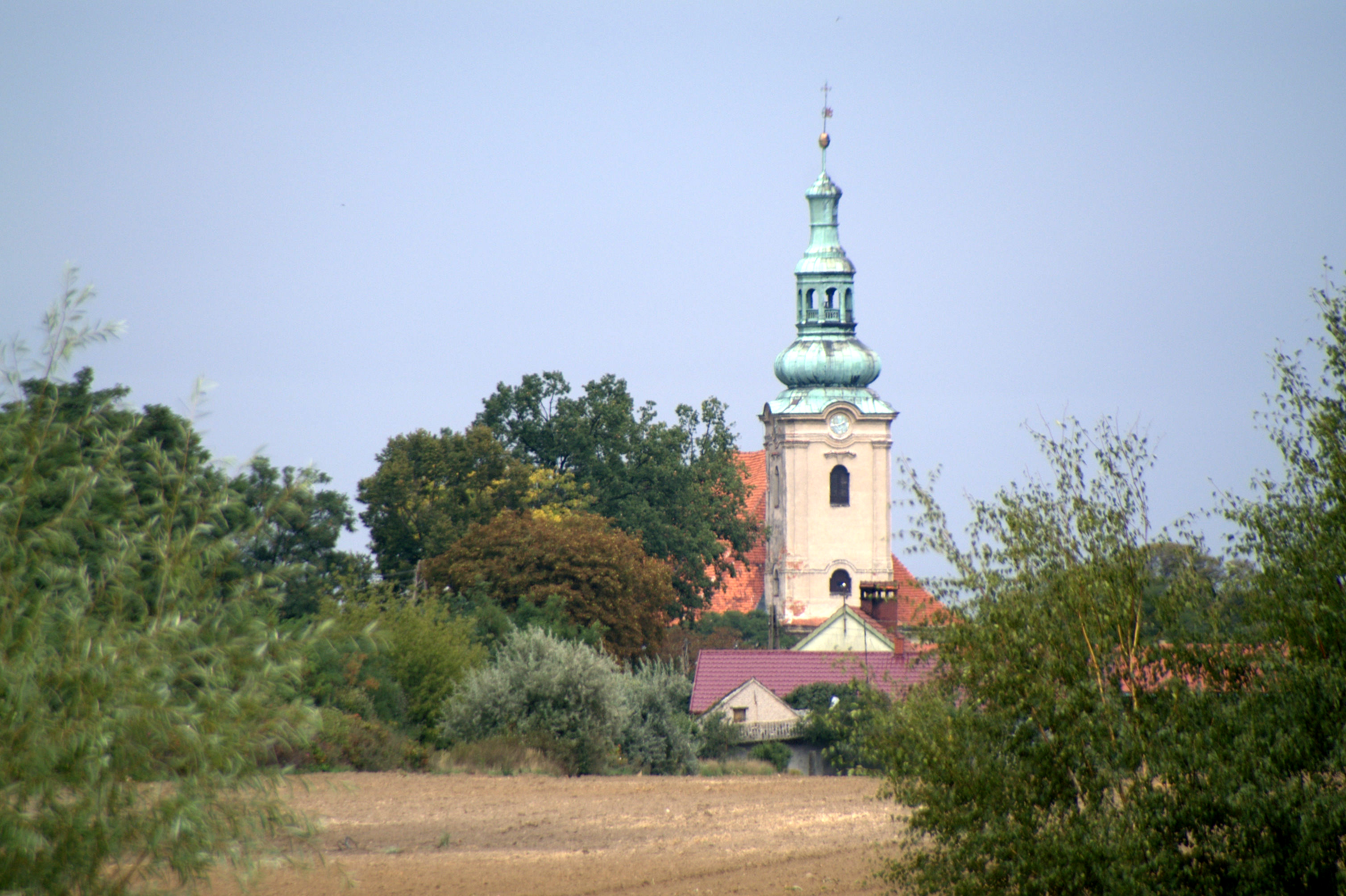 Kościół w Sicinach z widziany Łękanowa.